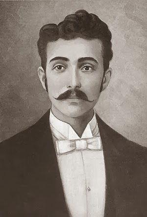 Tomas Regalado